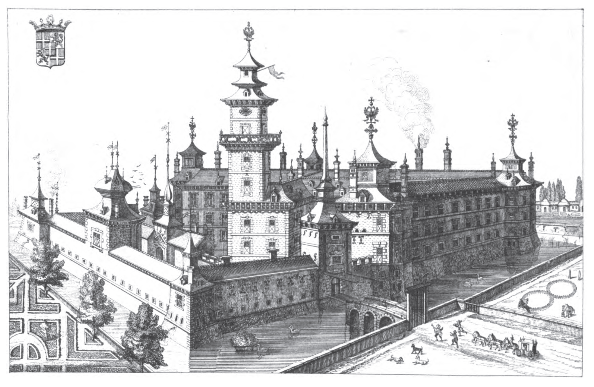 Gravure du château de Reckheim tel qu'à l'apogée du comté